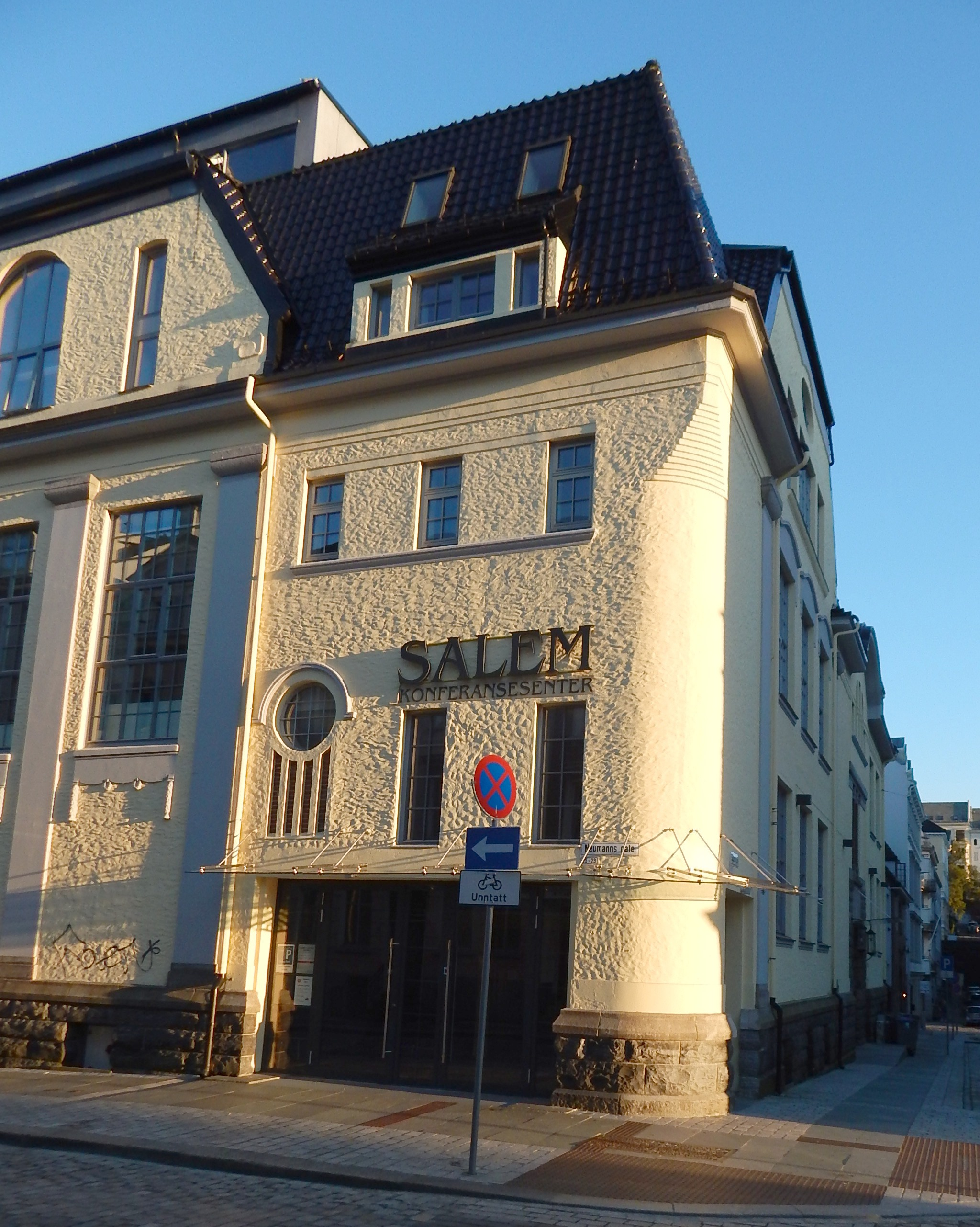 Salem konferansesenter i Bergen